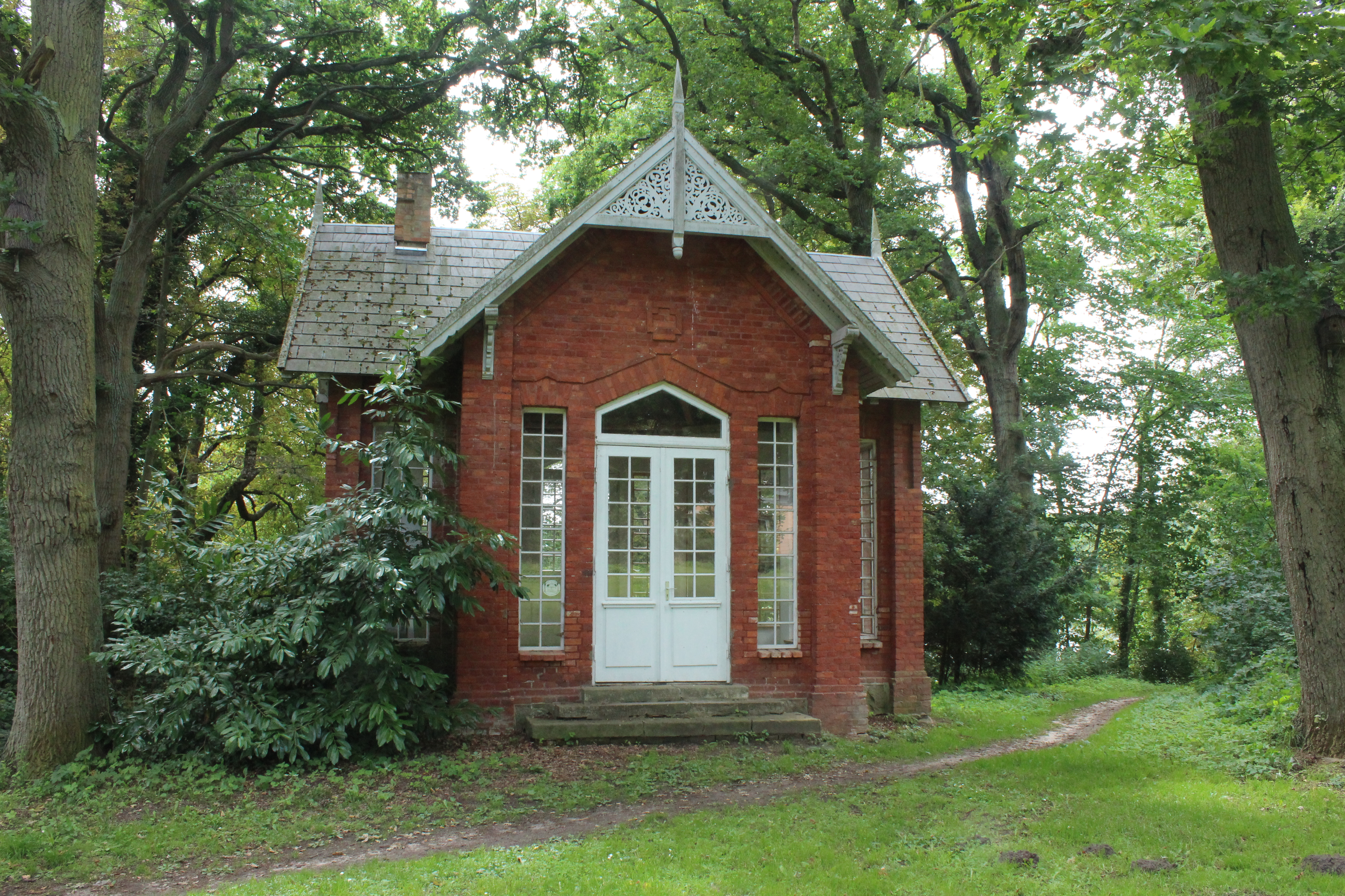 Treffpunkt von Claus Graf Schenk von Stauffenberg und Fritz-Dietlof von der Schulenburg zur Vorbereitung des Attentats auf Adolf Hitler.